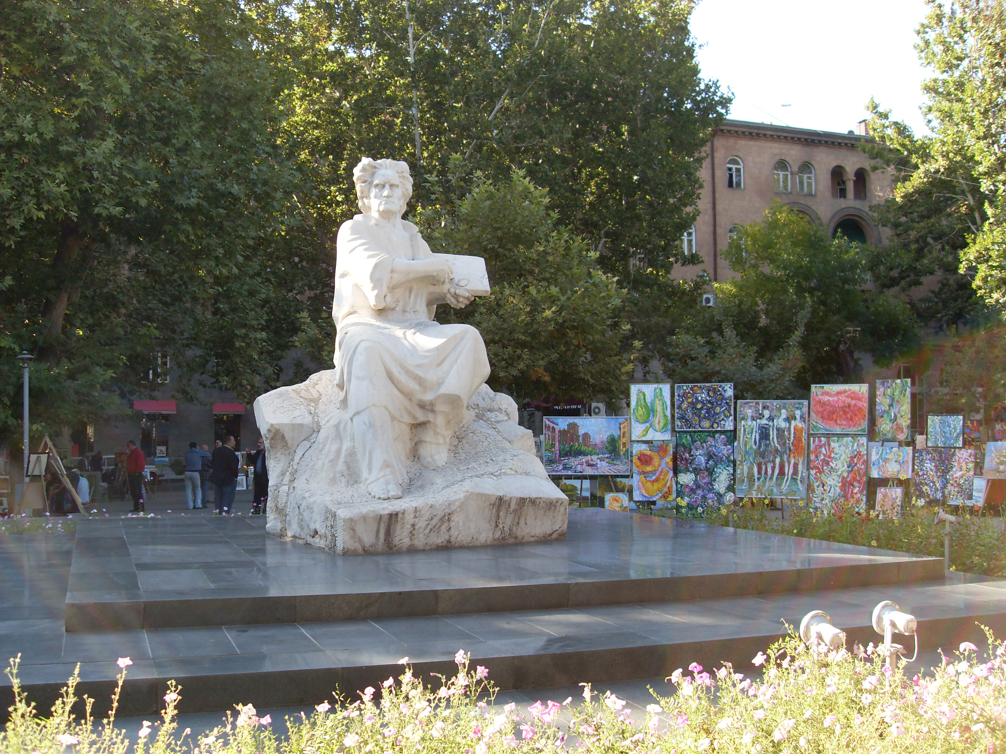 Մարտիրոս Սարյանի հուշարձանը Երևանում, 1986 թ., քանդ.` Լ. Թոքմաջյան, ճարտ.` Ա. Թարխանյան 6/141